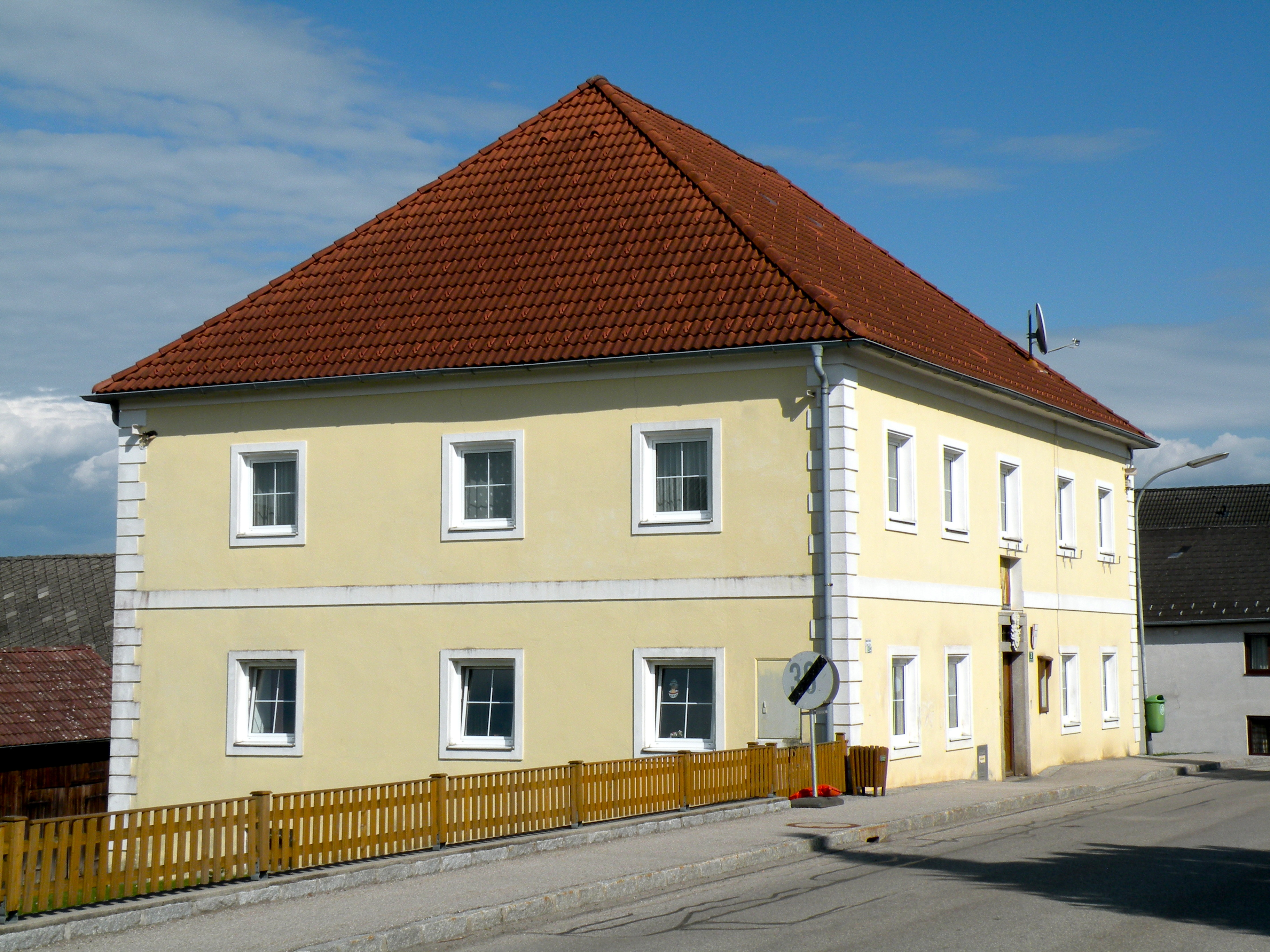 Sankt Barbara Spital (ehemaliges Hospital) in der Marktgemeinde Münzbach im Bezirk Perg in Oberösterreich